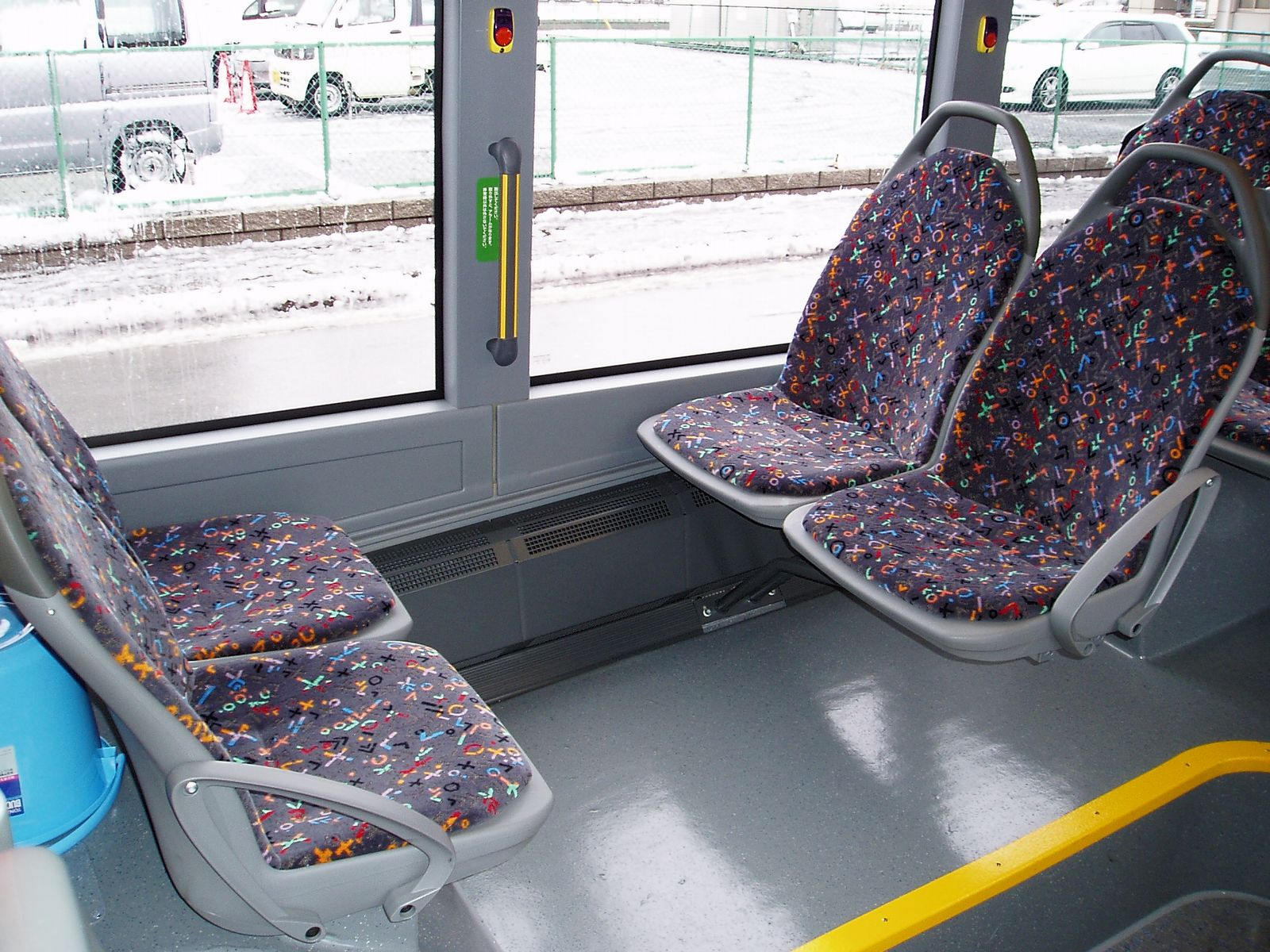 Kanachu A201 （あ201） "Twin Liner" Mercedes-Benz O530 "CITARO G", built 2007 at Atsugi AXT